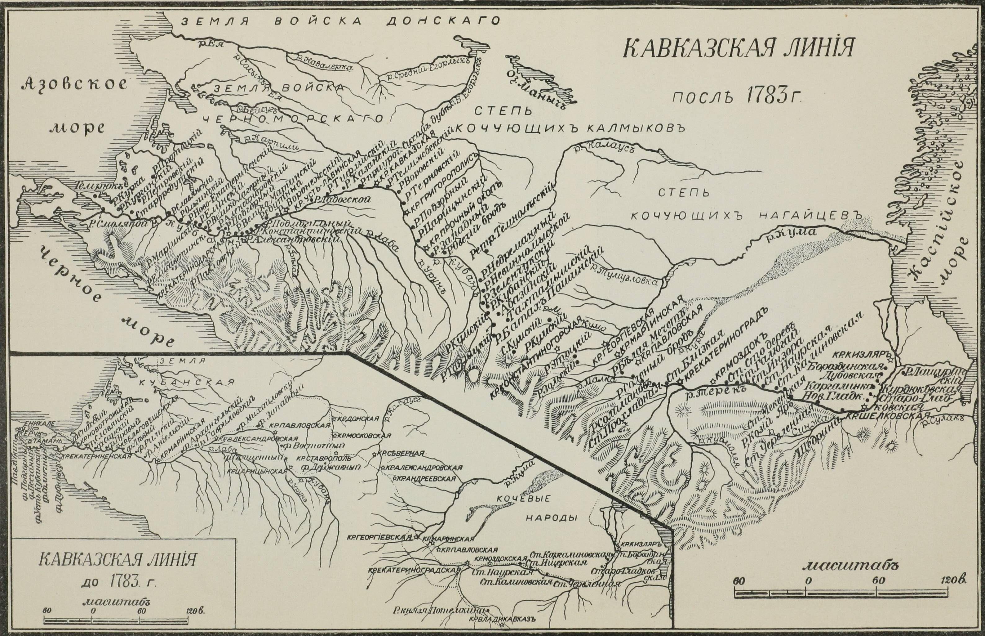 Кавказская линия до и после 1783 года. Это изображение было использовано для иллюстрирования статьи «Кавказская пограничная линия» опубликованной в одиннадцатом томе «Военной энциклопедии», который был издан книгоиздательским товариществом И. Д. Сытина в 1913 году в столице Российской империи городе Санкт-Петербурге.